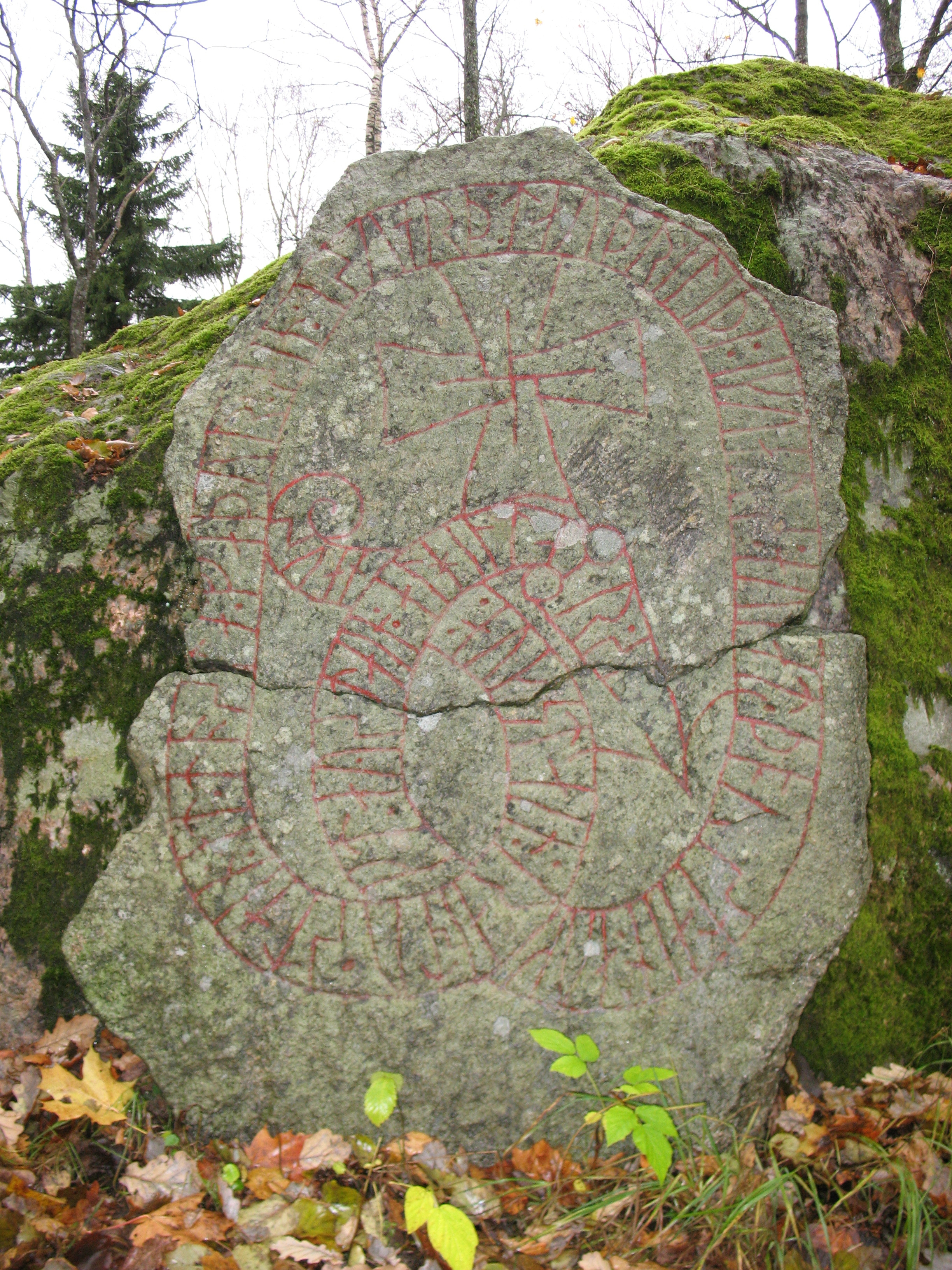 Runestone Sö 254